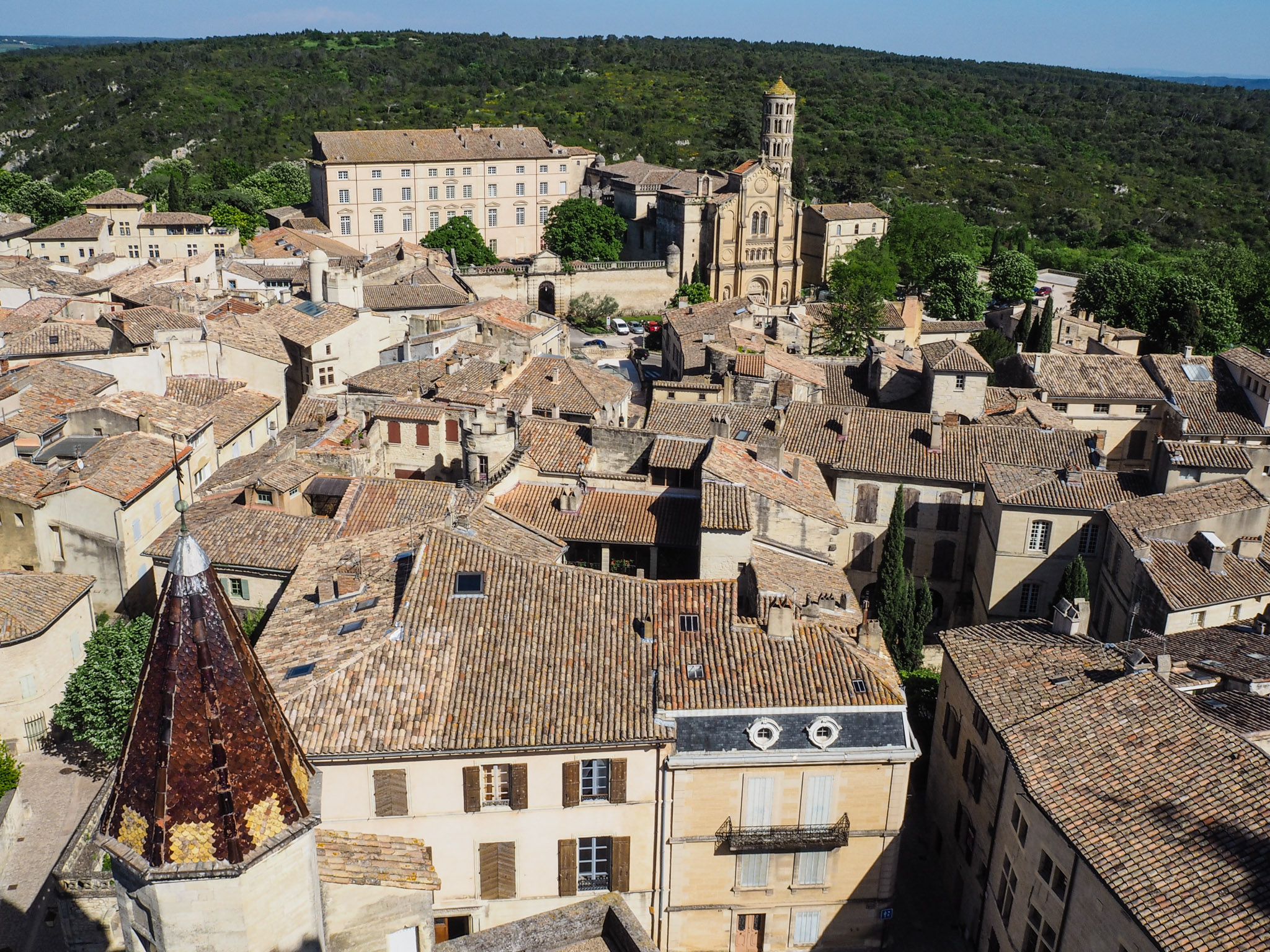 View from Duché d'Uzès